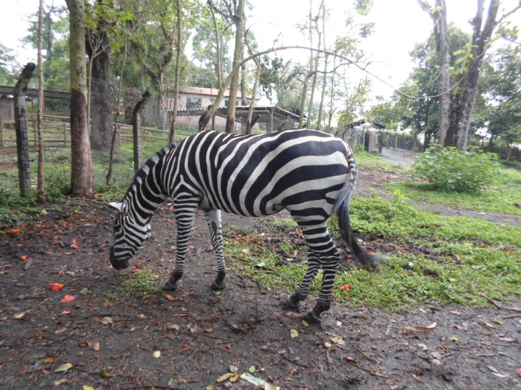 Cebra en el Zoológico Matecaña (Pereira)